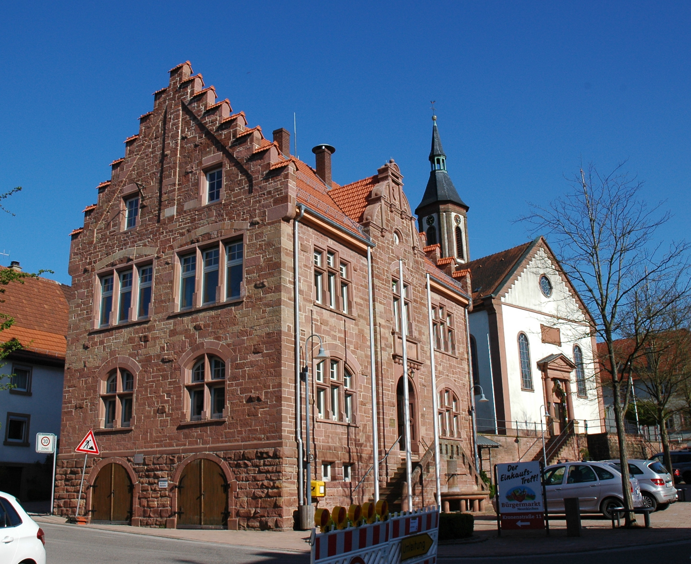 Rathaus und evangelische Paul-Gerhardt-Kirche in Neunkirchen (Baden)